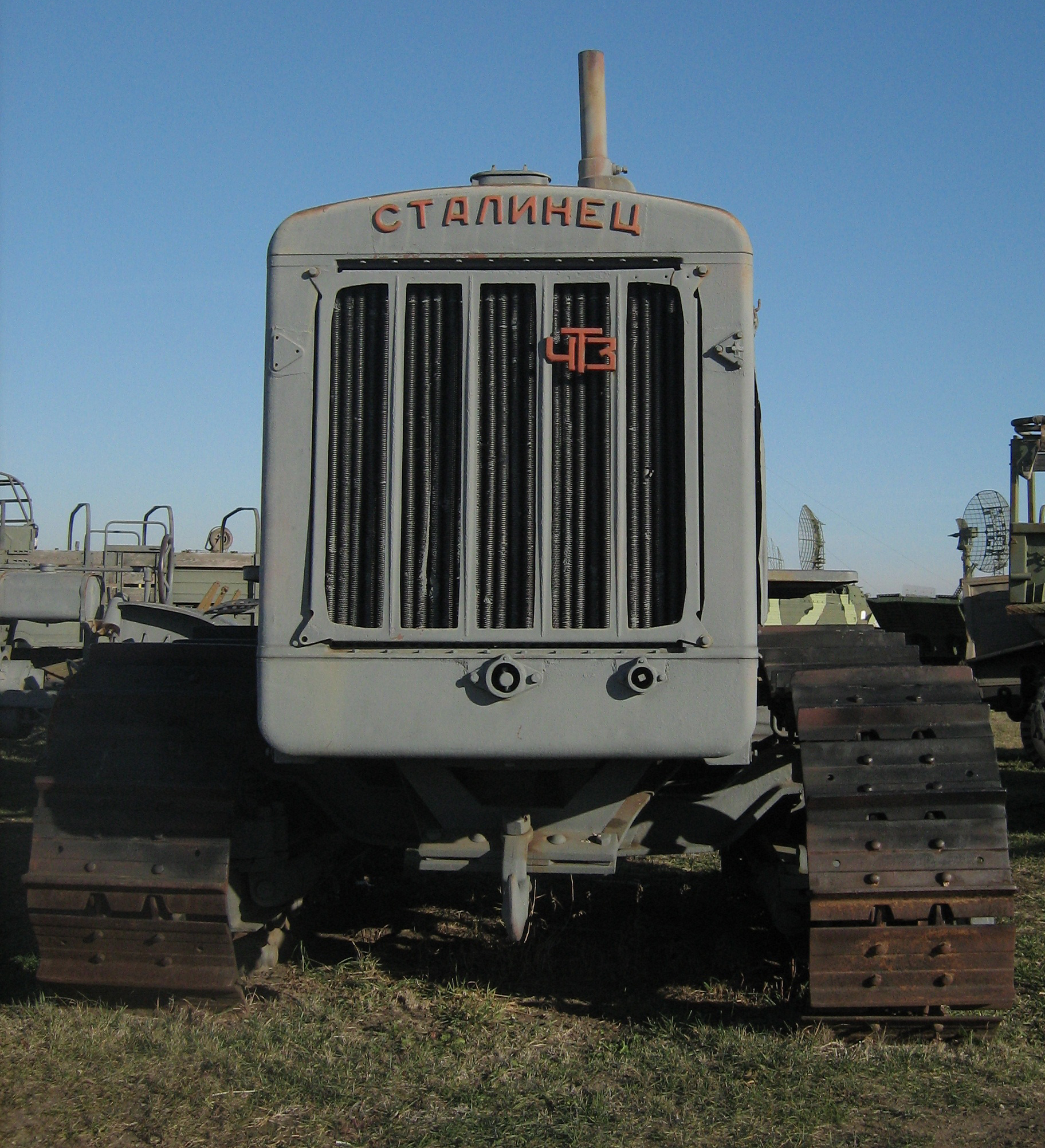 Трактор "С-65" в музее техники ВАЗа. Вид спереди.